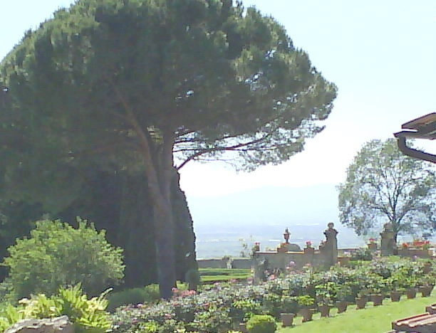 Il giardino e il parco della Villa Medicea della Topaia